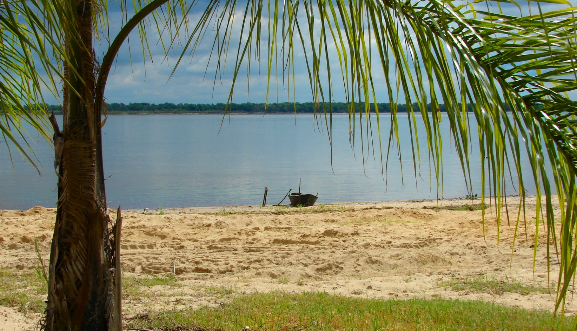 La Paz, Entre Rios, Argentina